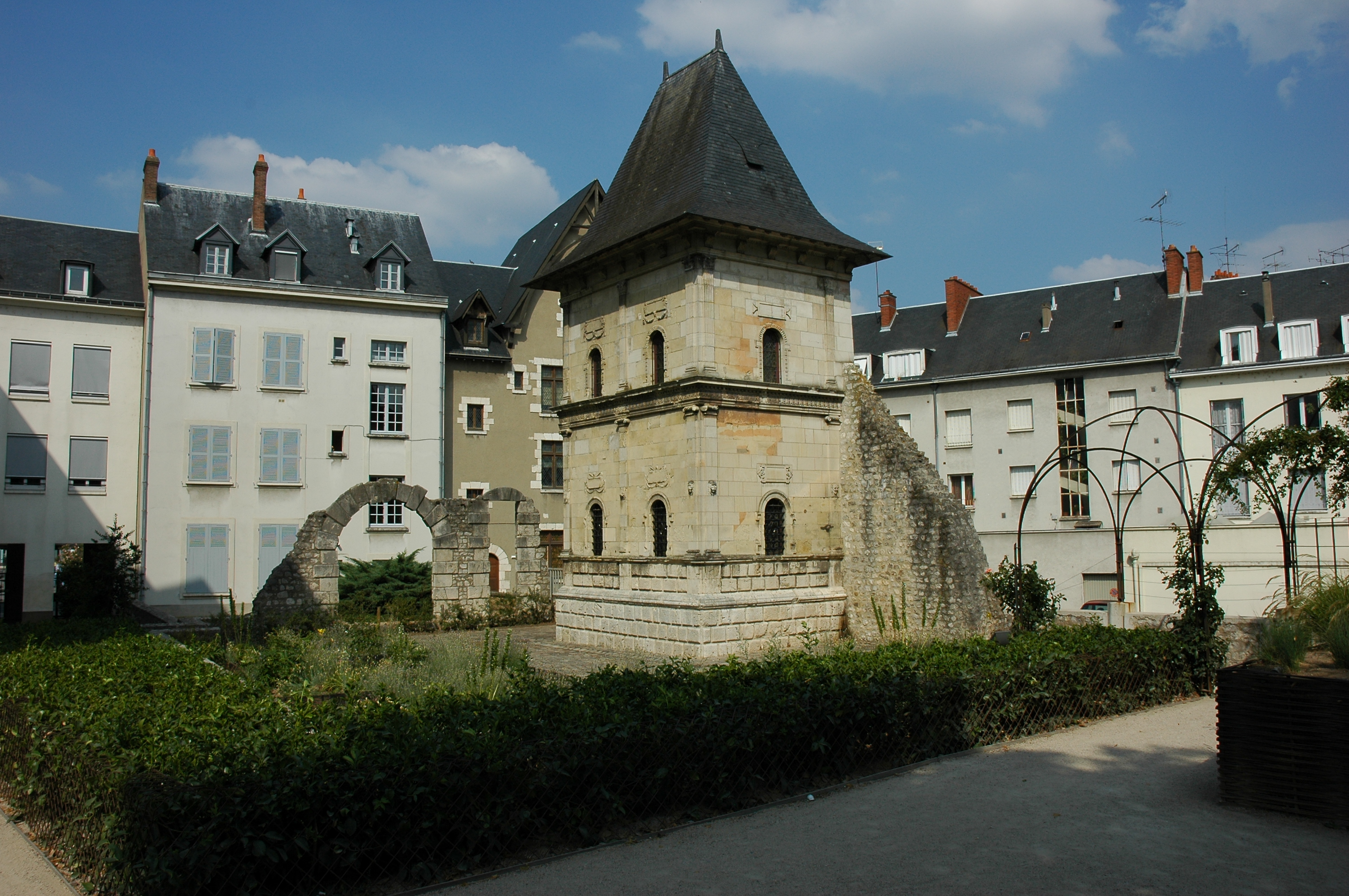 France Loiret Orléans Le jardin Jacques Boucher Photographie prise par GIRAUD Patrick